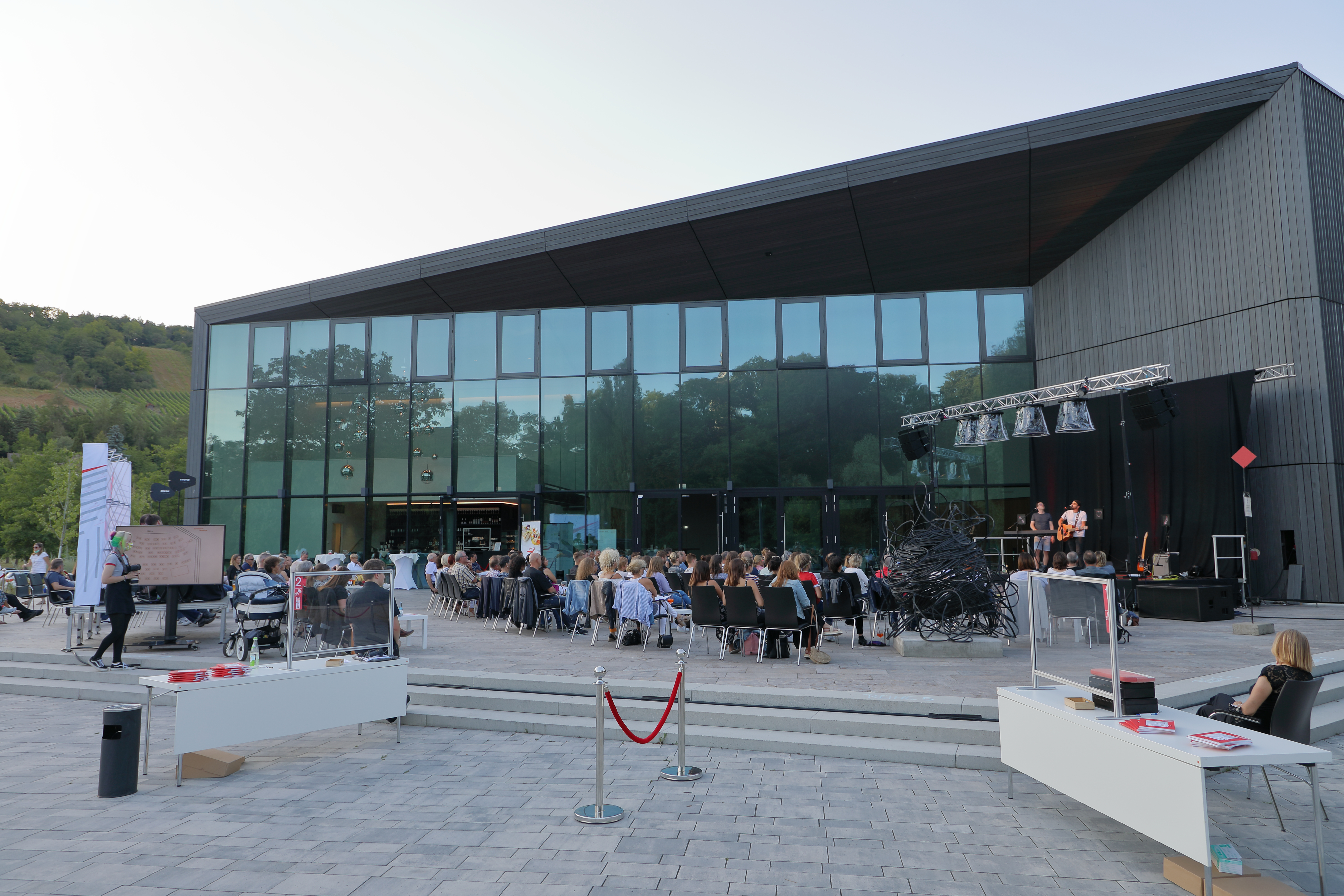 Der Singer-Songwriter Mailänder bei einem Open-Air-Auftritt auf der Terrasse der Tauberphilharmonie Weikersheim. Das Konzert fand statt zum Saisonauftakt nach dem großen Lockdown infolge der COVID-19-Pandemie 2020. An den Keyboards wurde er begleitet von Kogge.